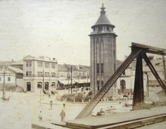 青岛中山路堂邑路路口旧影